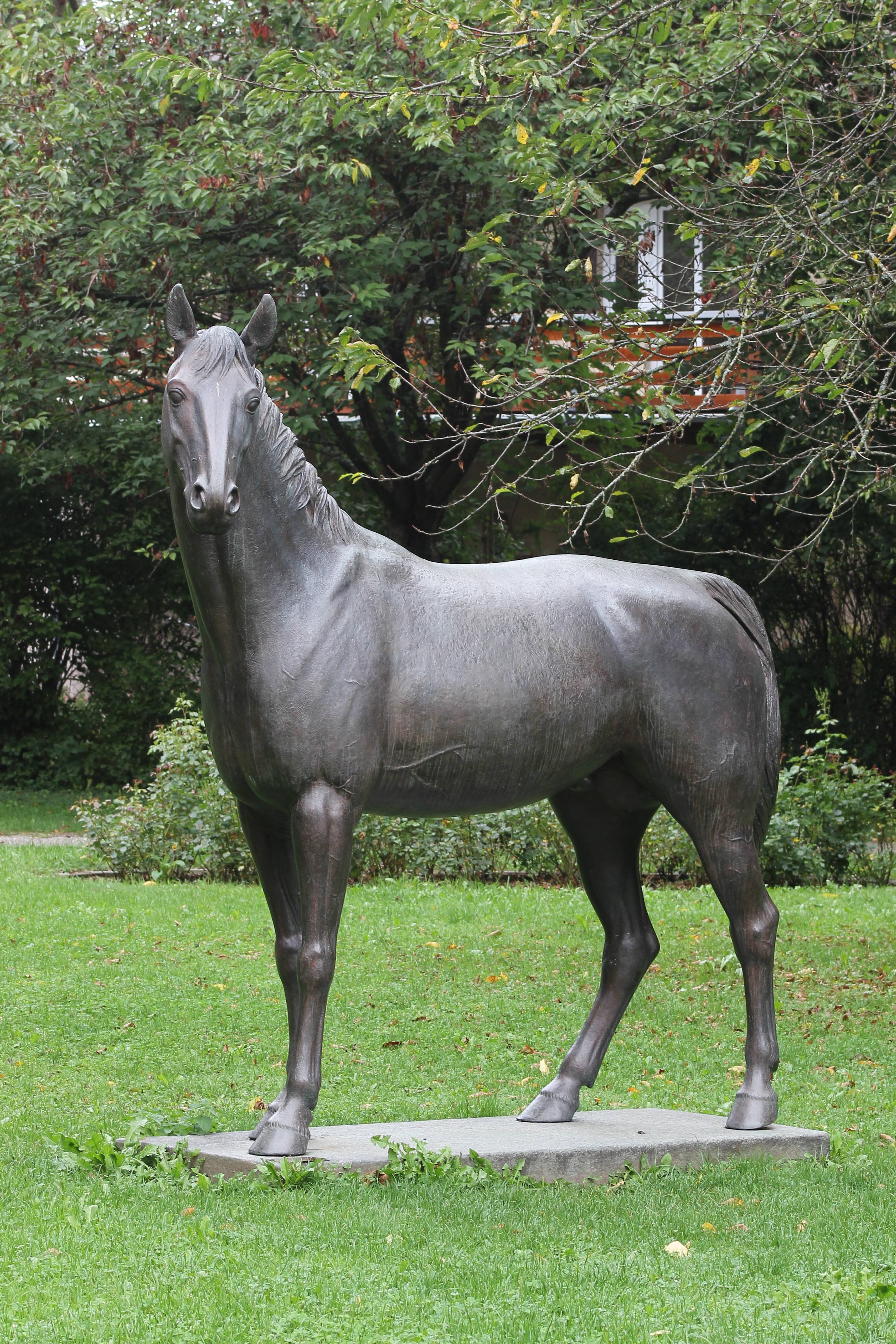 Warwick Rex, Springpferd von Alwin Schockemöhle, Olympiasieger 1976. Bronzestatue von Heinrich Faltermeier im Stadtgarten von Bad Wörishofen zwischen Gärtnerweg und Unterer Mühlstraße